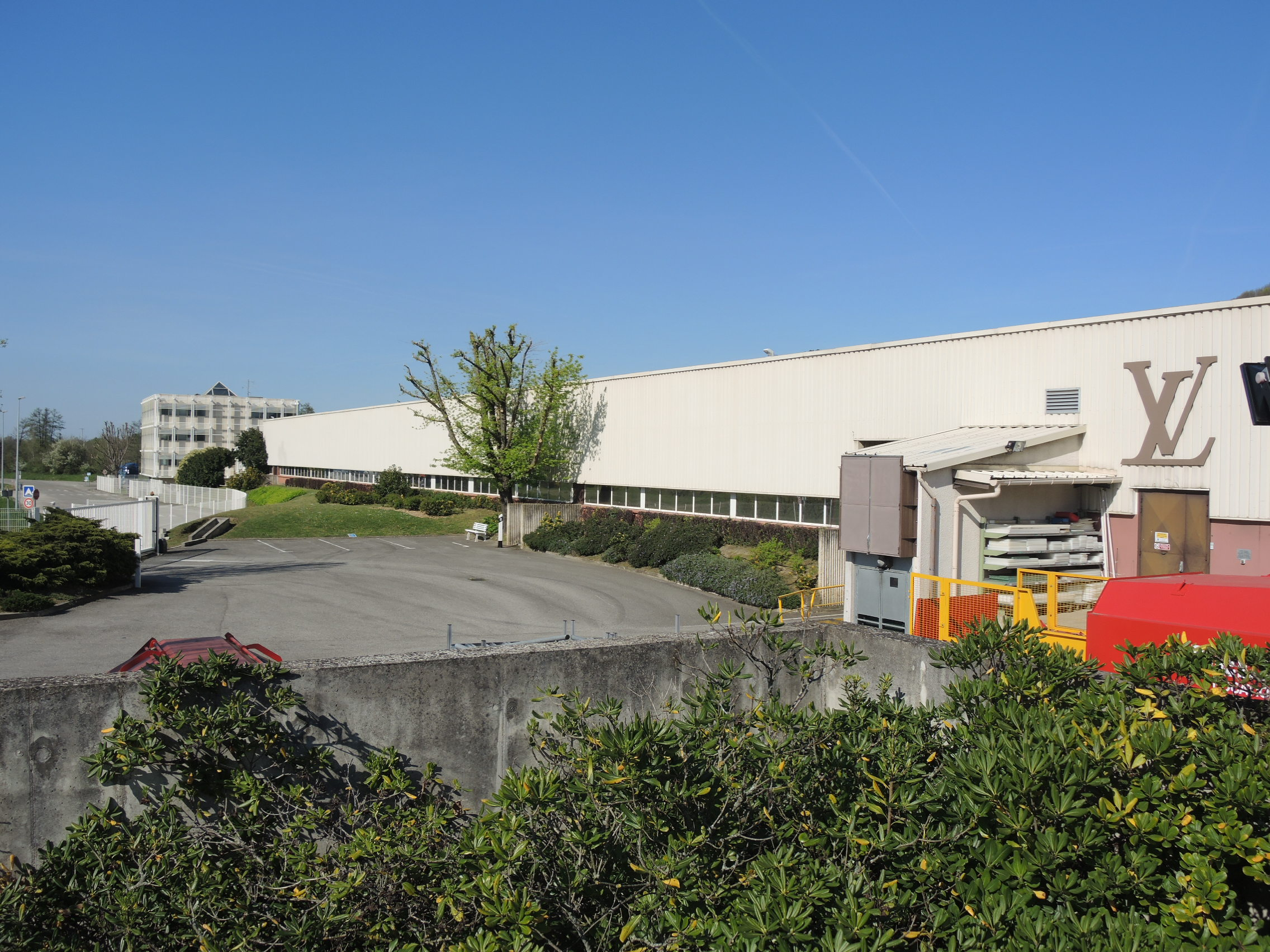 Sarras vue partielle